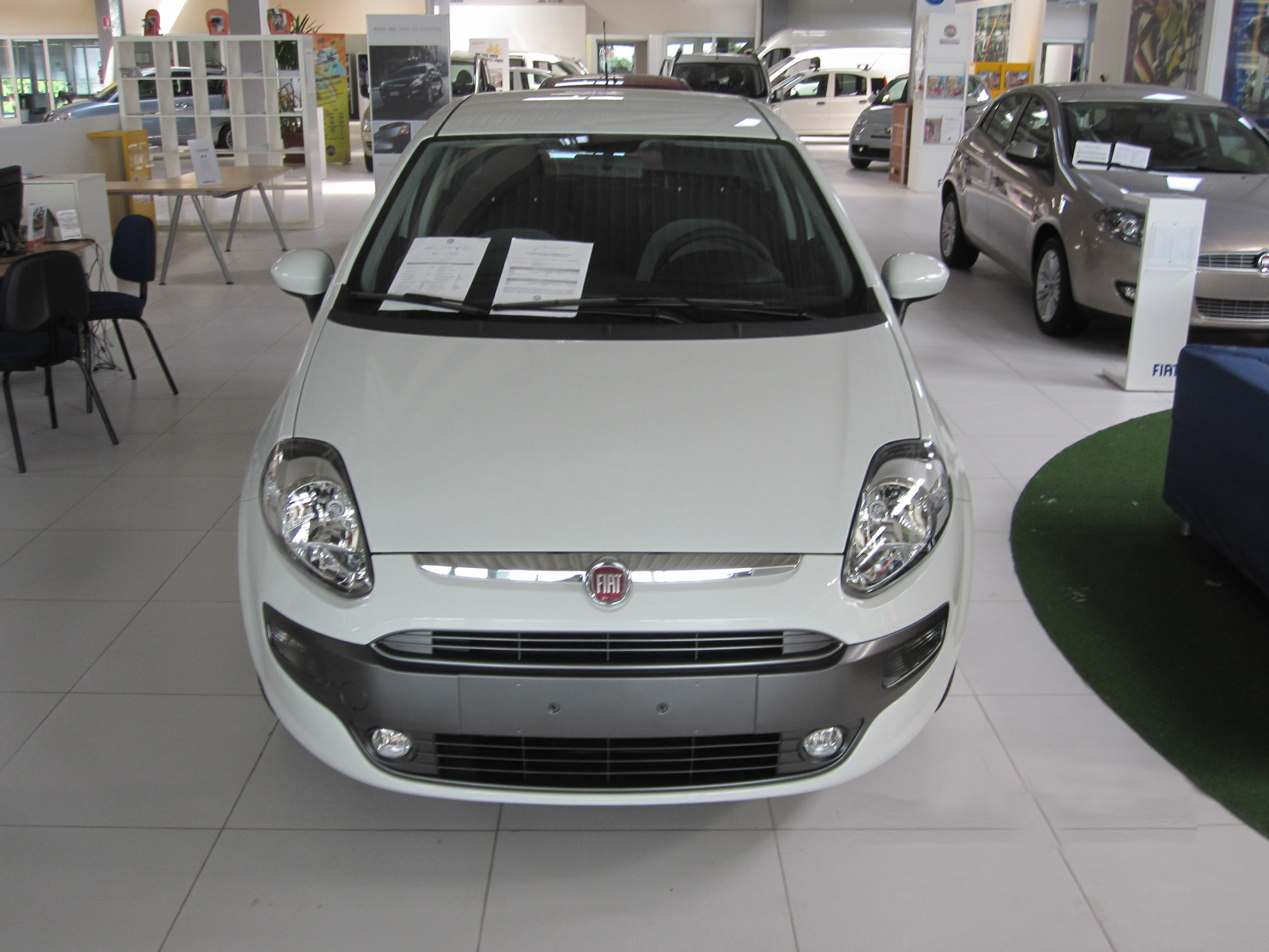 Punto Evo